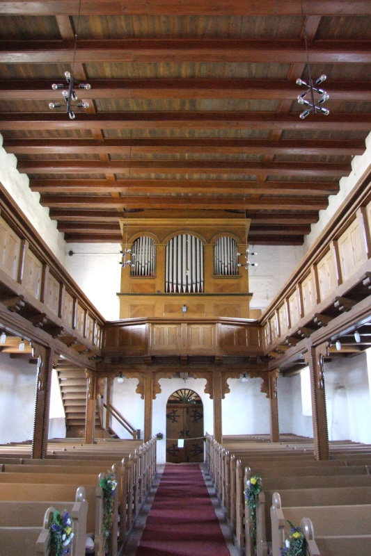 St. Georg Kirche in Arneburg, Innenraum